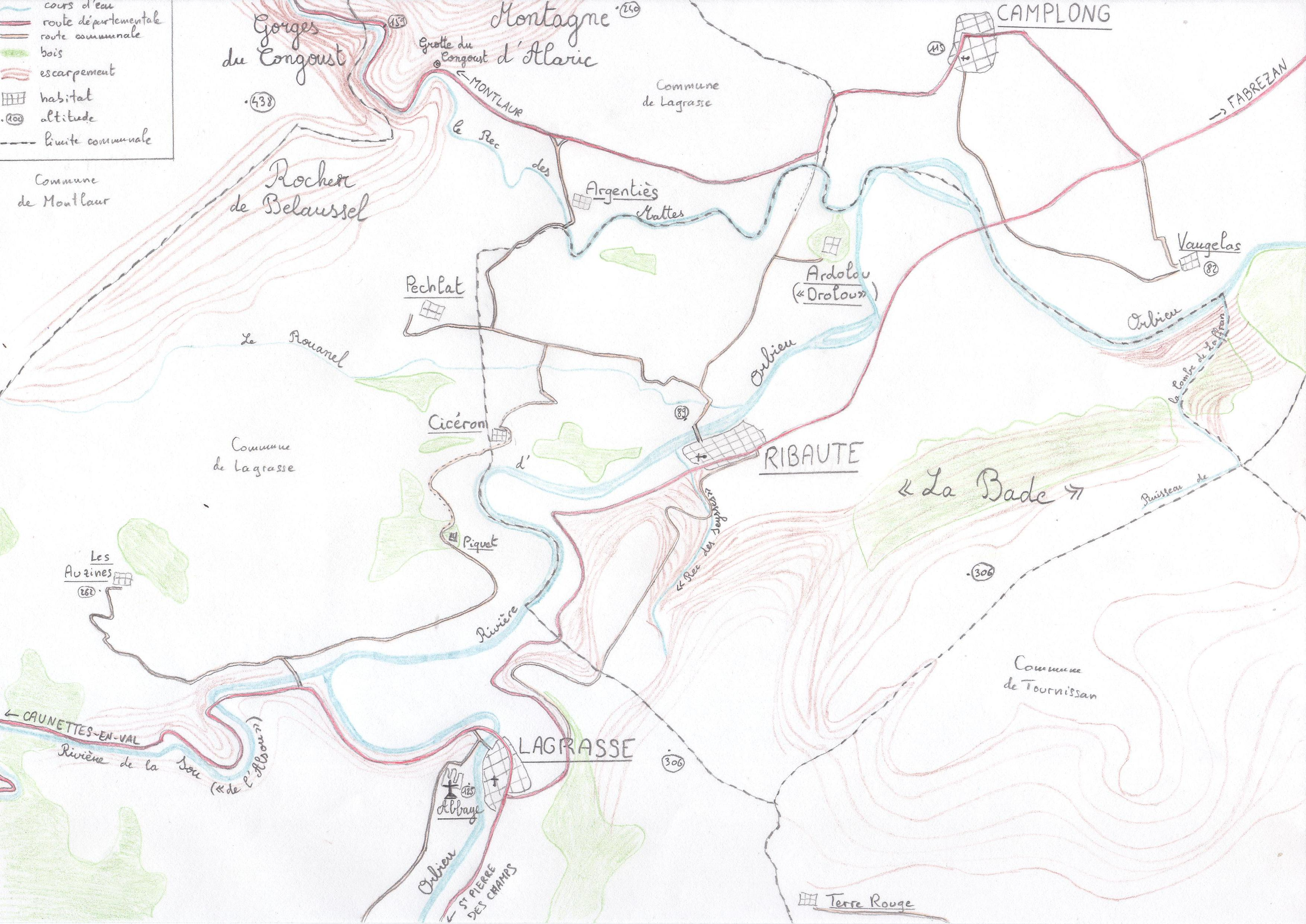 Carte géographique de la commune de Ribaute (Aude) et des communes limitrophes